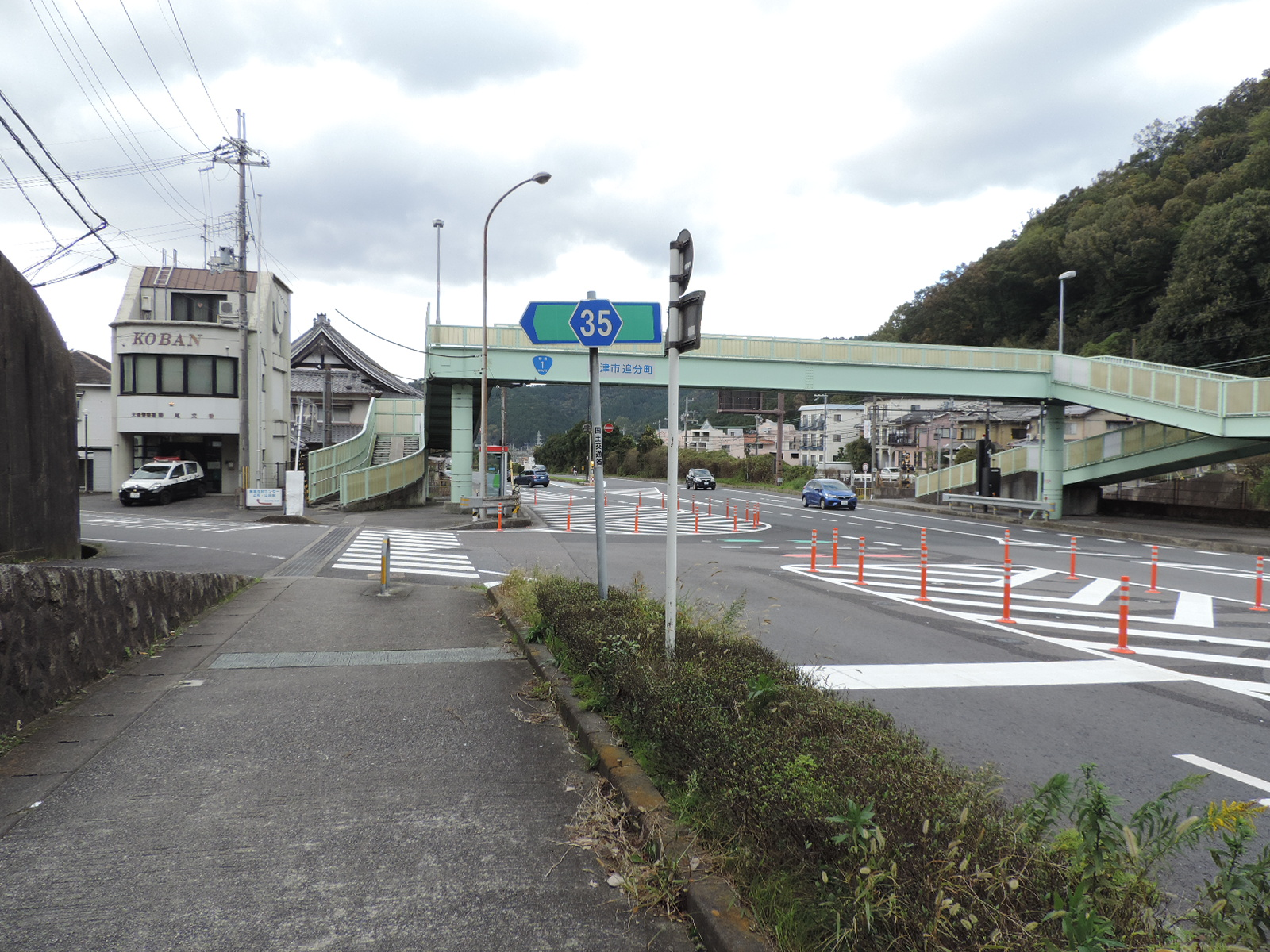 滋賀県道35号大津淀線の起点。国道1号から分岐する。